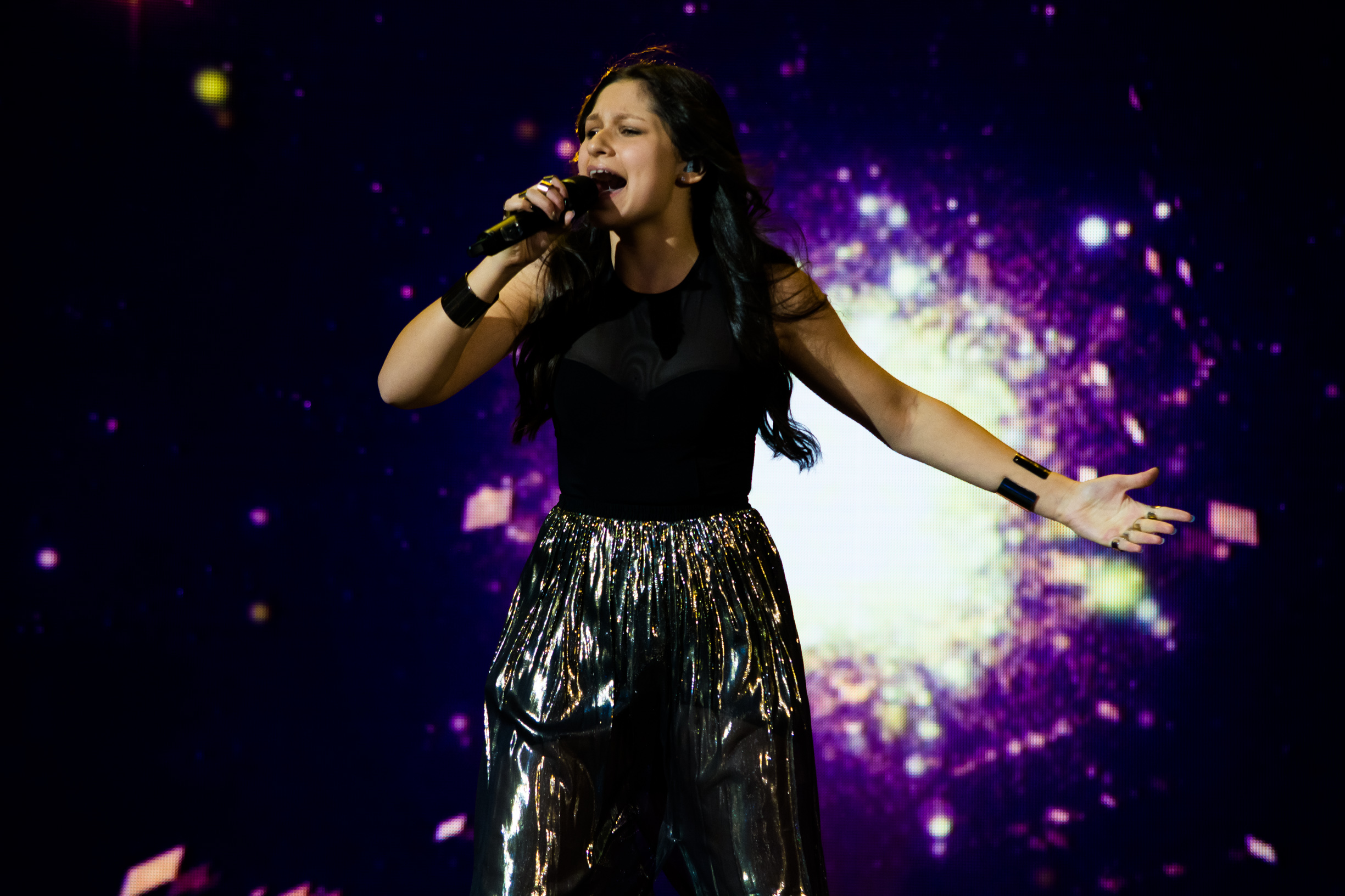 Белла Пейдж на сцене Детского Евровидения 2015 («Армеец», София) во время генеральной репетиции